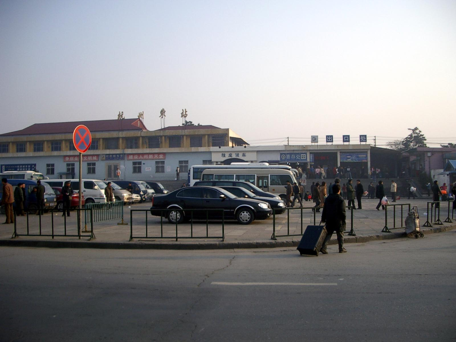 杭州東駅/杭州东站